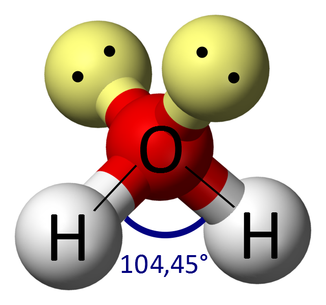 Modello a sfere e bastoncini della molecola d'acqua, mostrante anche i doppietti solitari dell'ossigeno e l'angolo di legame.